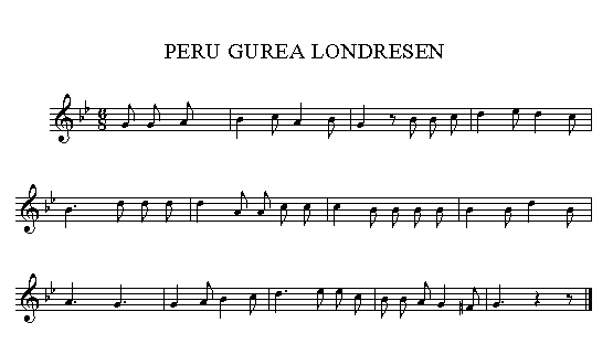 Peru Gurearen partitura